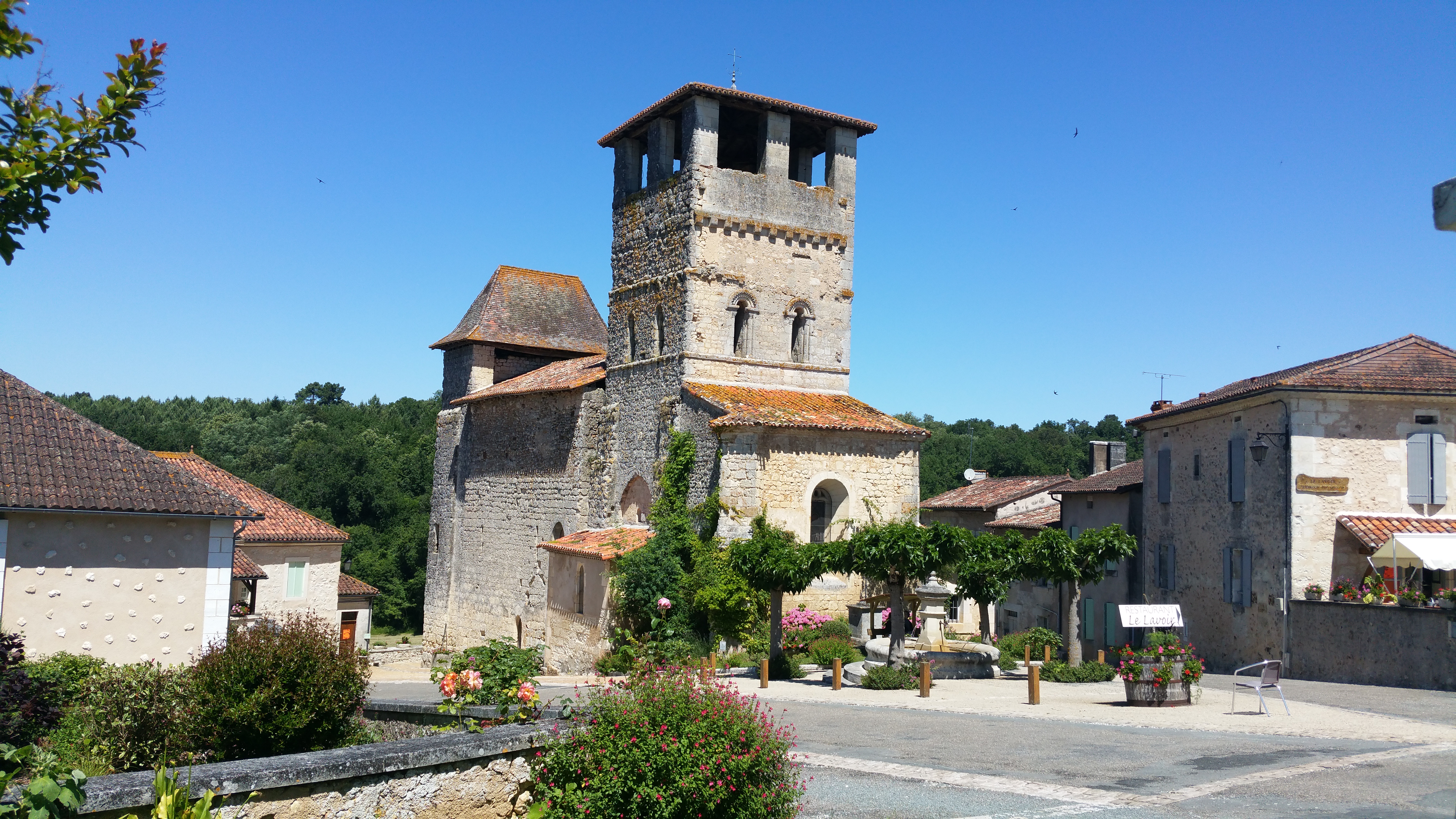 EGLISE DE SIORAC DE RIBERAC